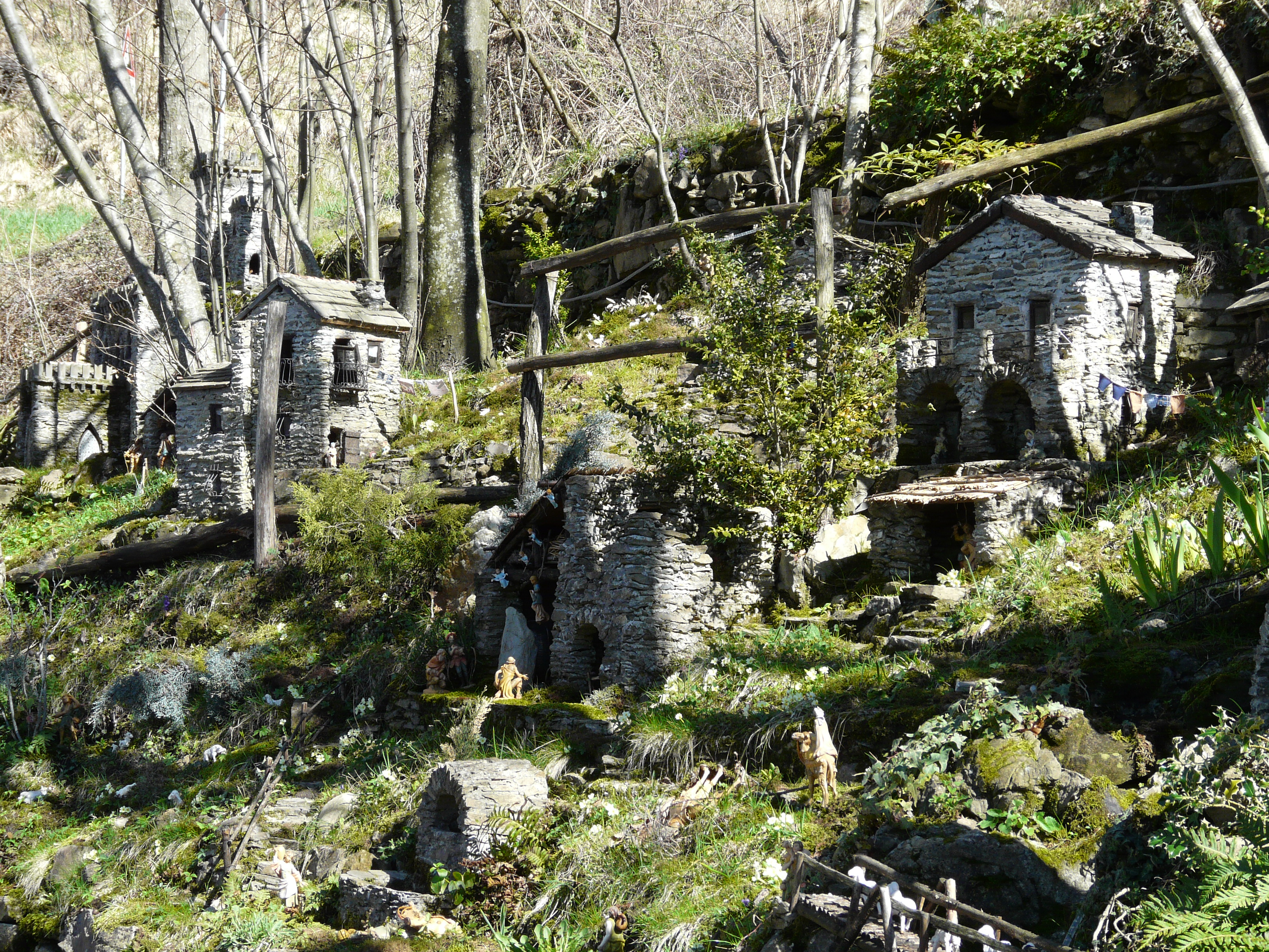 Presepe nel bosco, Viganego, Bargagli, Liguria, Italia